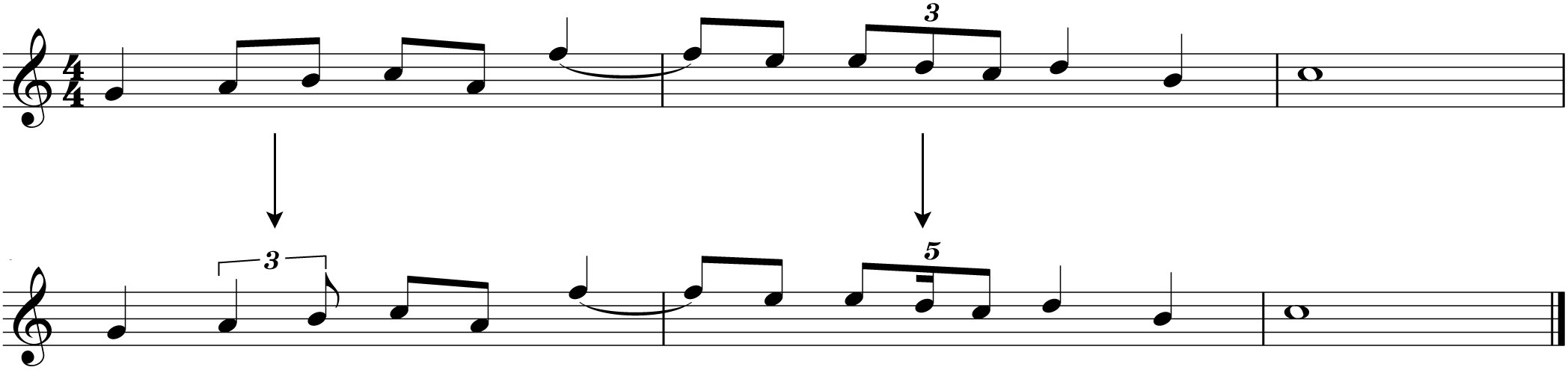 Exemple d'une interprétation musicale agogique